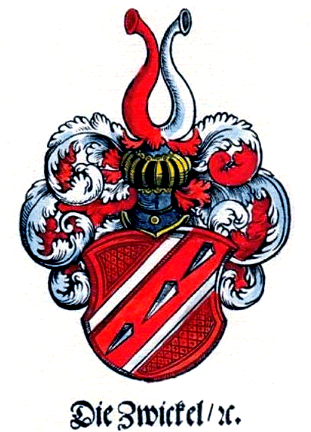 Stammwappen der Zwickel